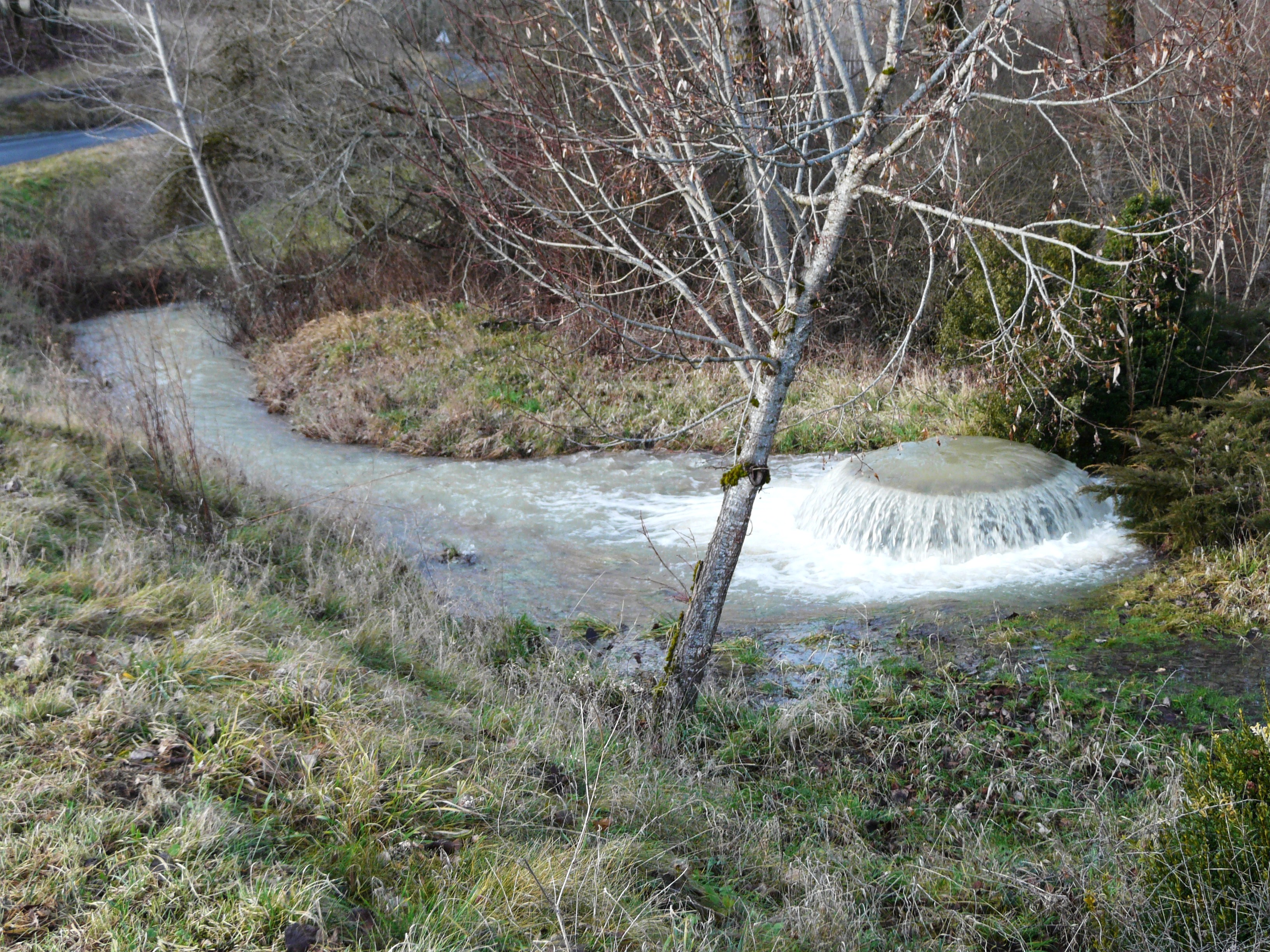 Source artésienne du Blâme (après une période de plusieurs jours de fortes pluies), puits de Bontemps, Brouchaud, Dordogne, France